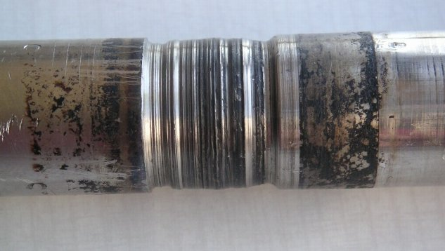 Usure d'un arbre de transmission par abrasion sous un joint d'étanchéité